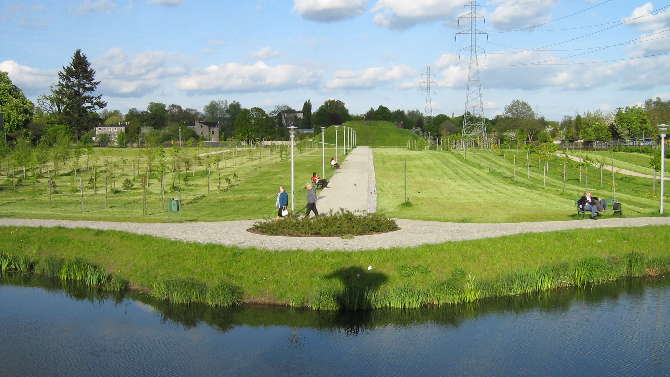 Park Ocalałych w Łodzi - widok ogólny